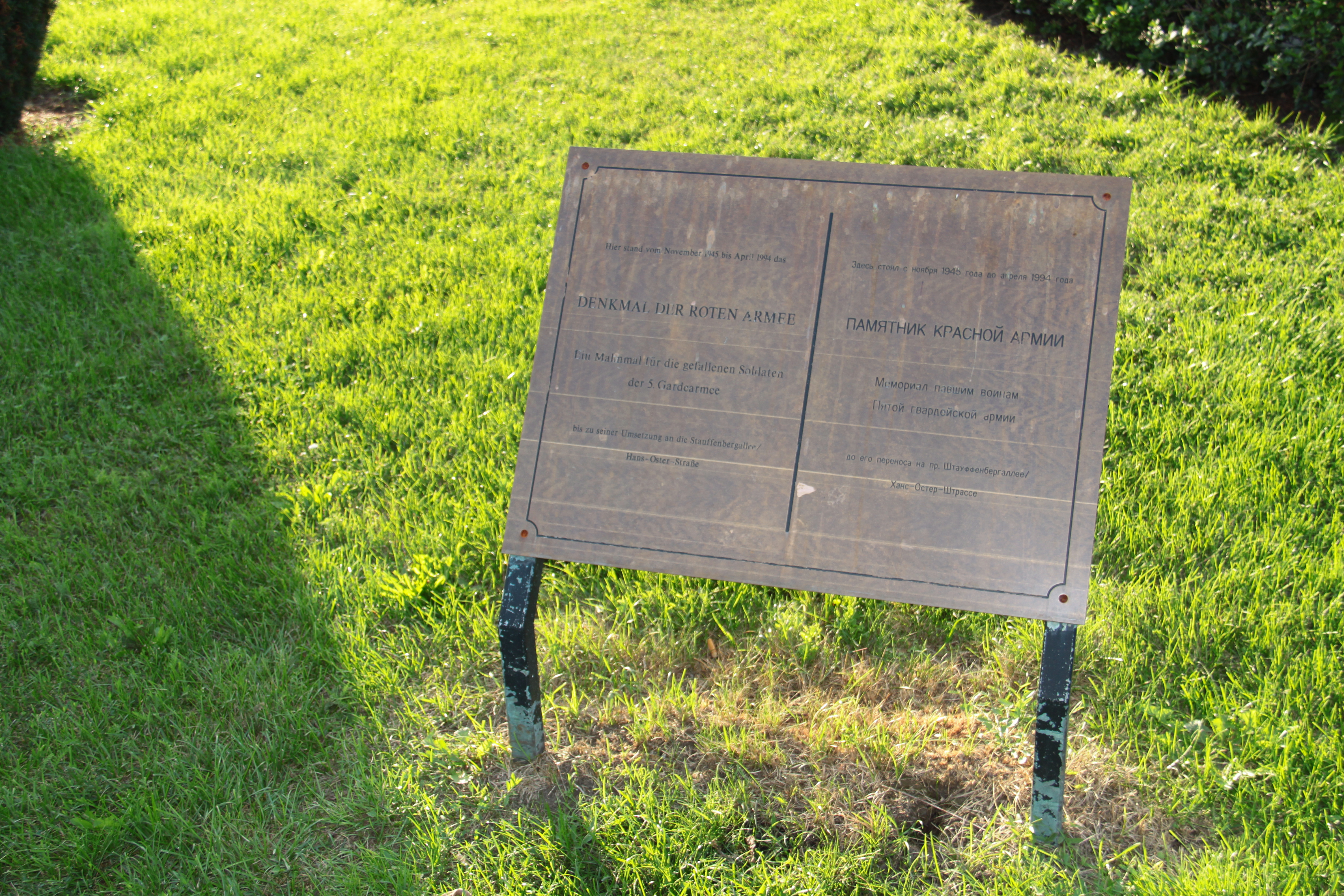 Hinweistafel auf den ehemaligen Standort des Denkmal der Roten Armee, Albertplatz, Dresden